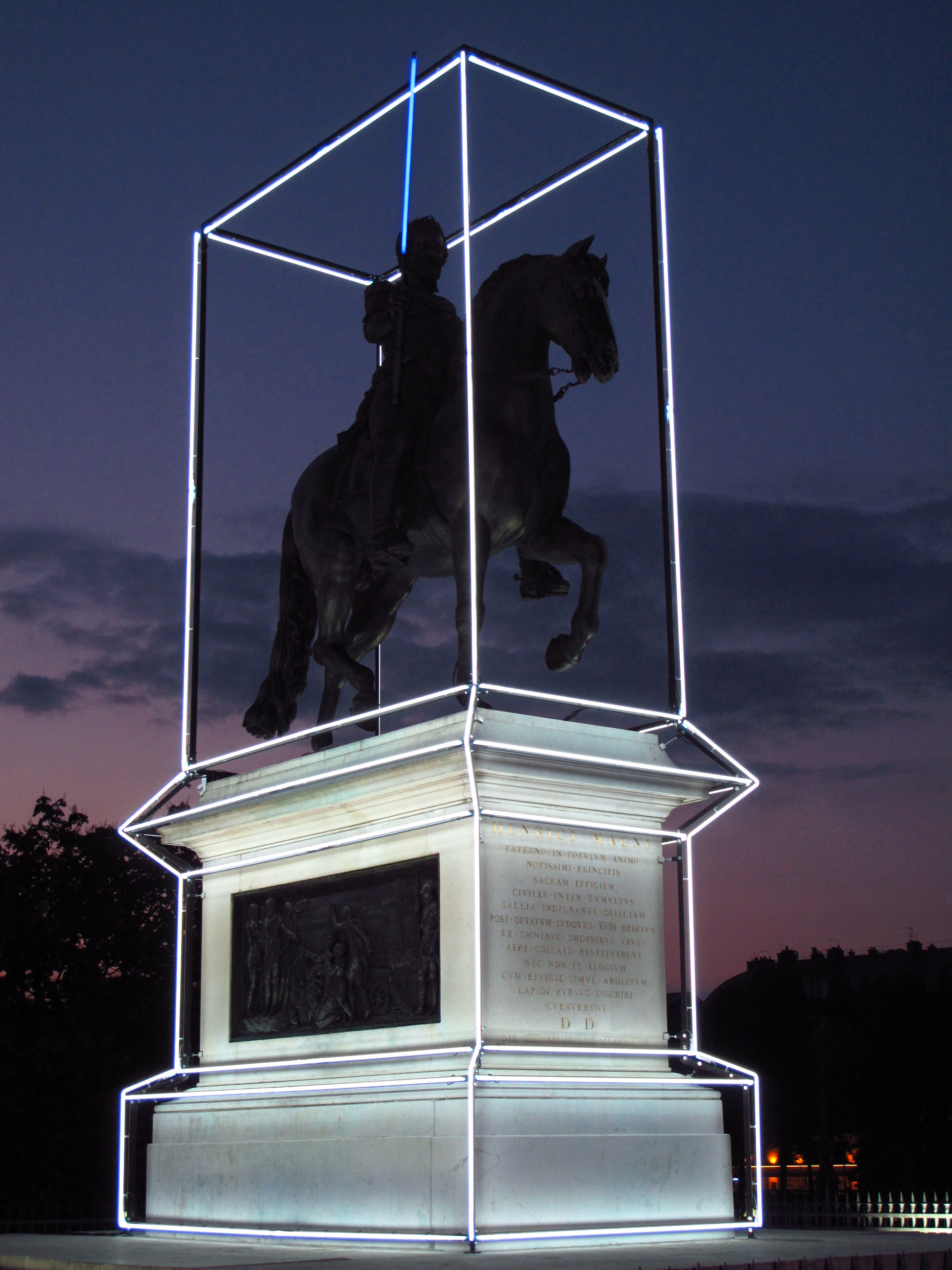 La statue d'Henri IV sur le Pont-Neuf, décorée par Jean-Charles de Castelbajac, pour les 400 ans de la mort du roi.